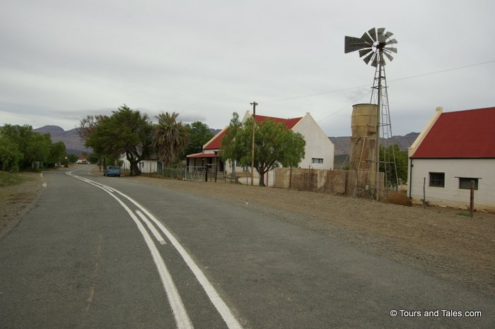 Klaarstroom